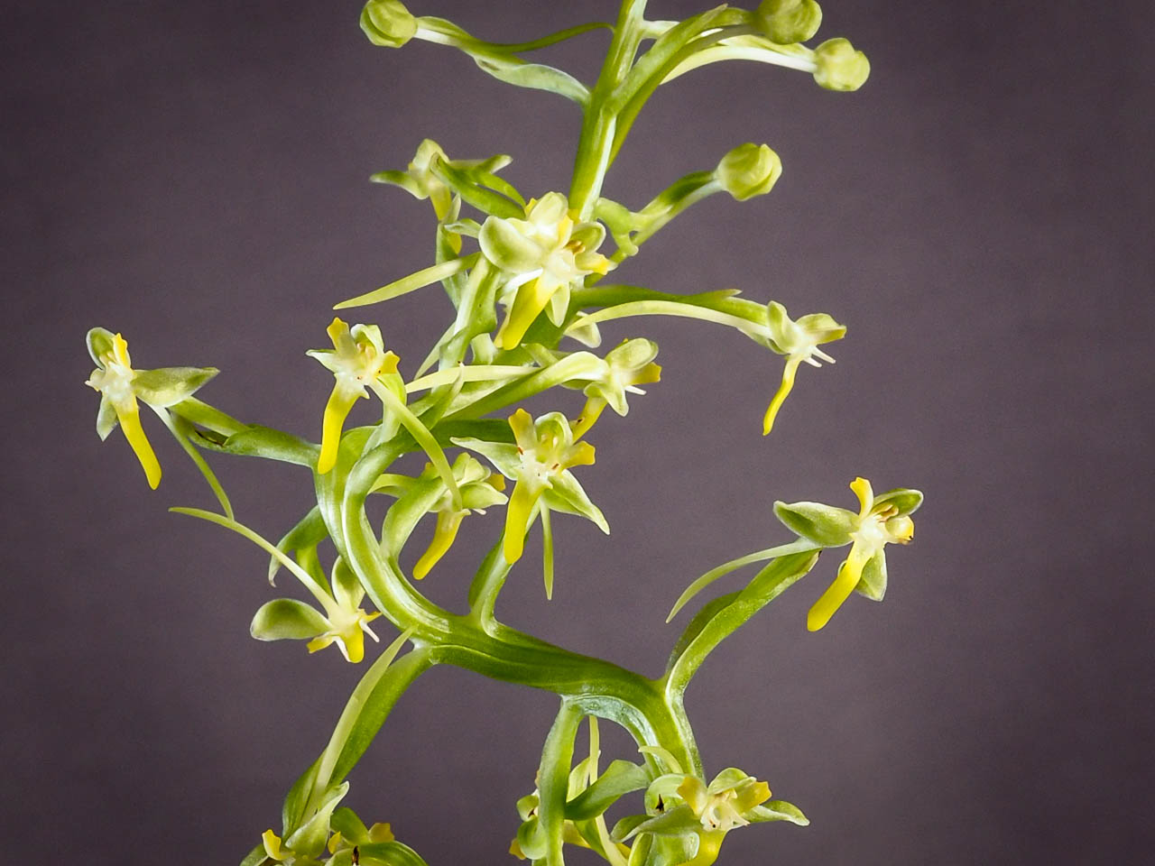 Habenaria floribunda